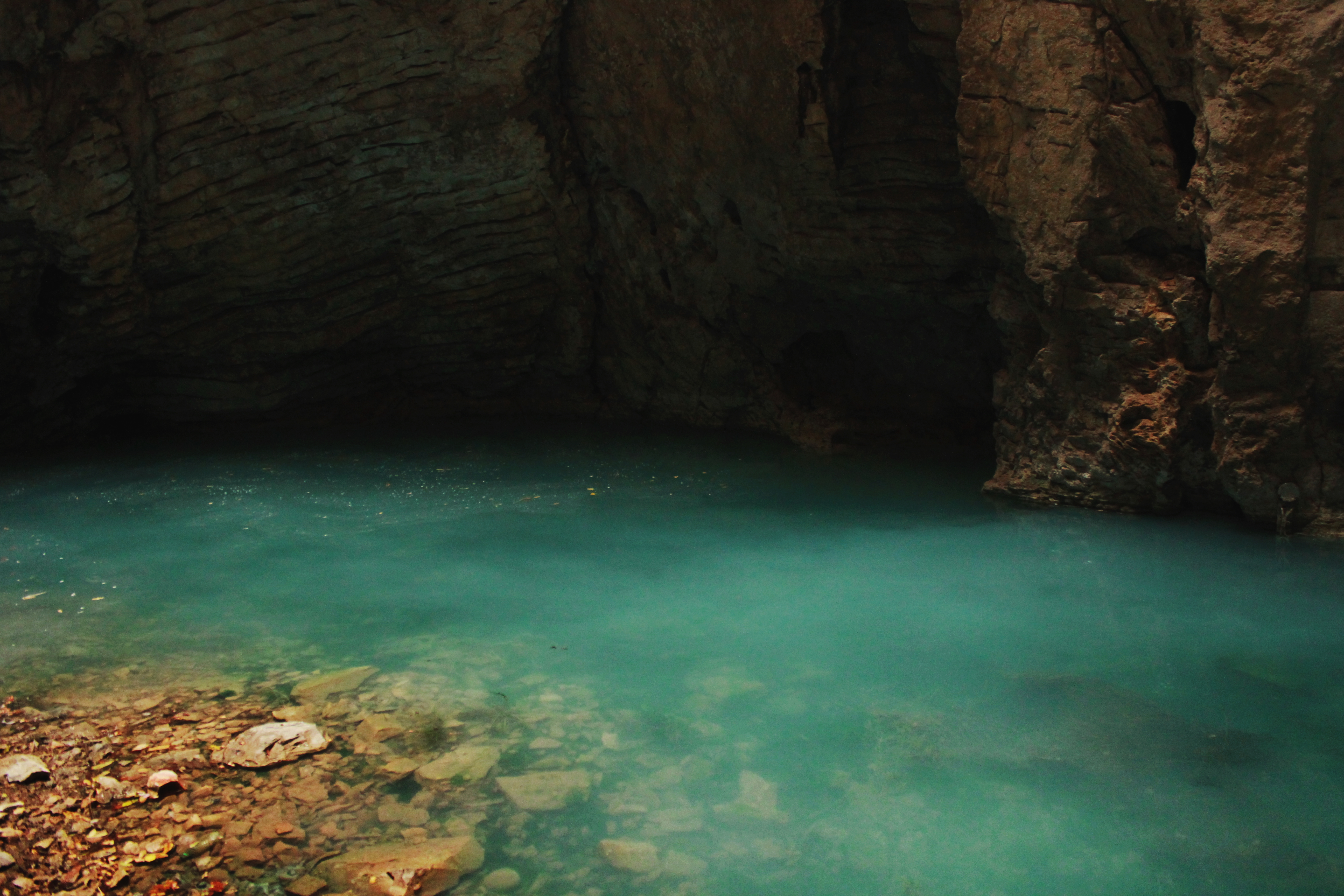 Большой провал на горе Машук, Пятигорск